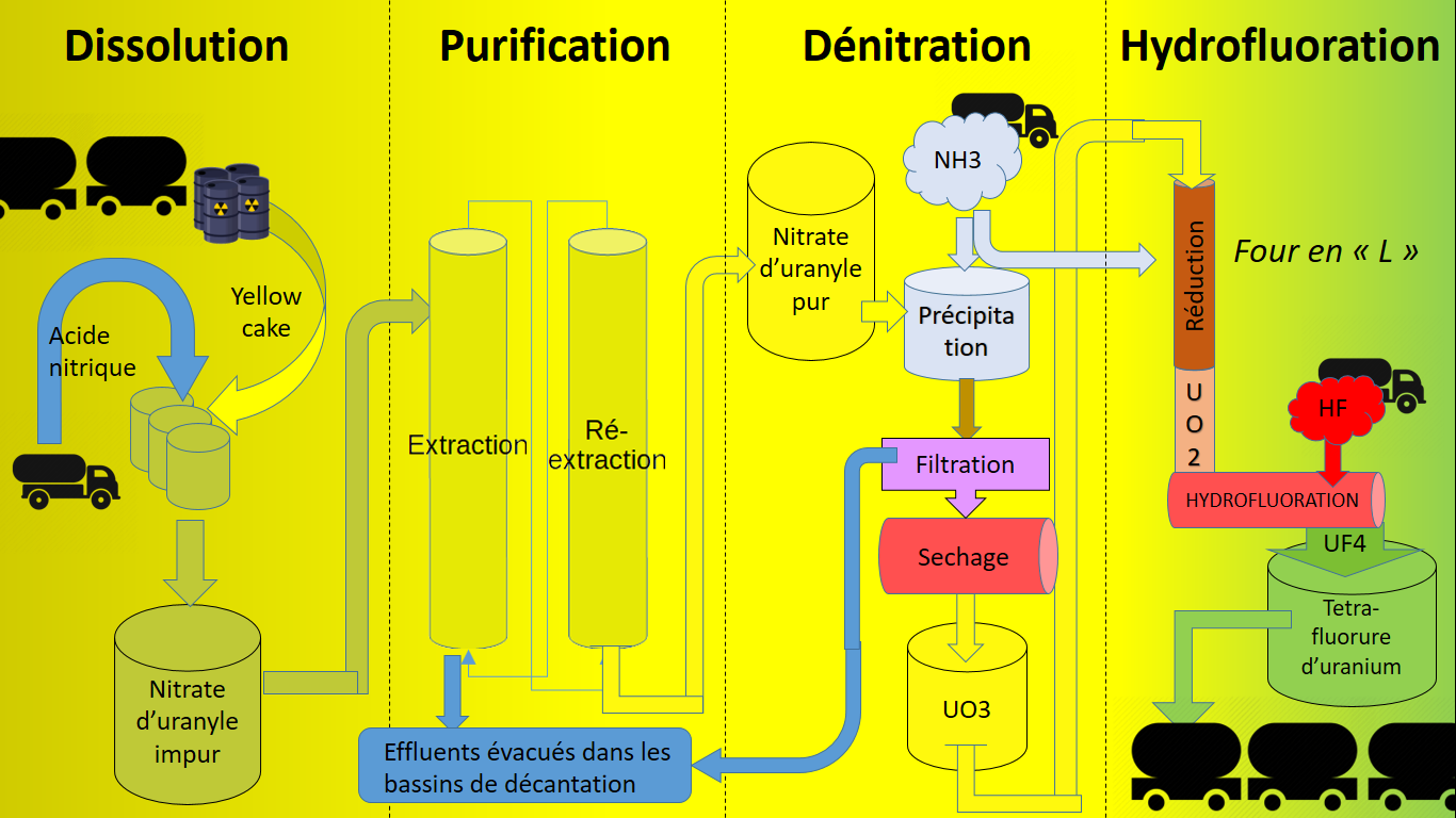 Schéma représentant les différents procédés chimiques permettant de raffiner les concentrés d'oxydes d'uranium provenant des mines et de les convertir en tetrafluorure d'uranium (UF4).